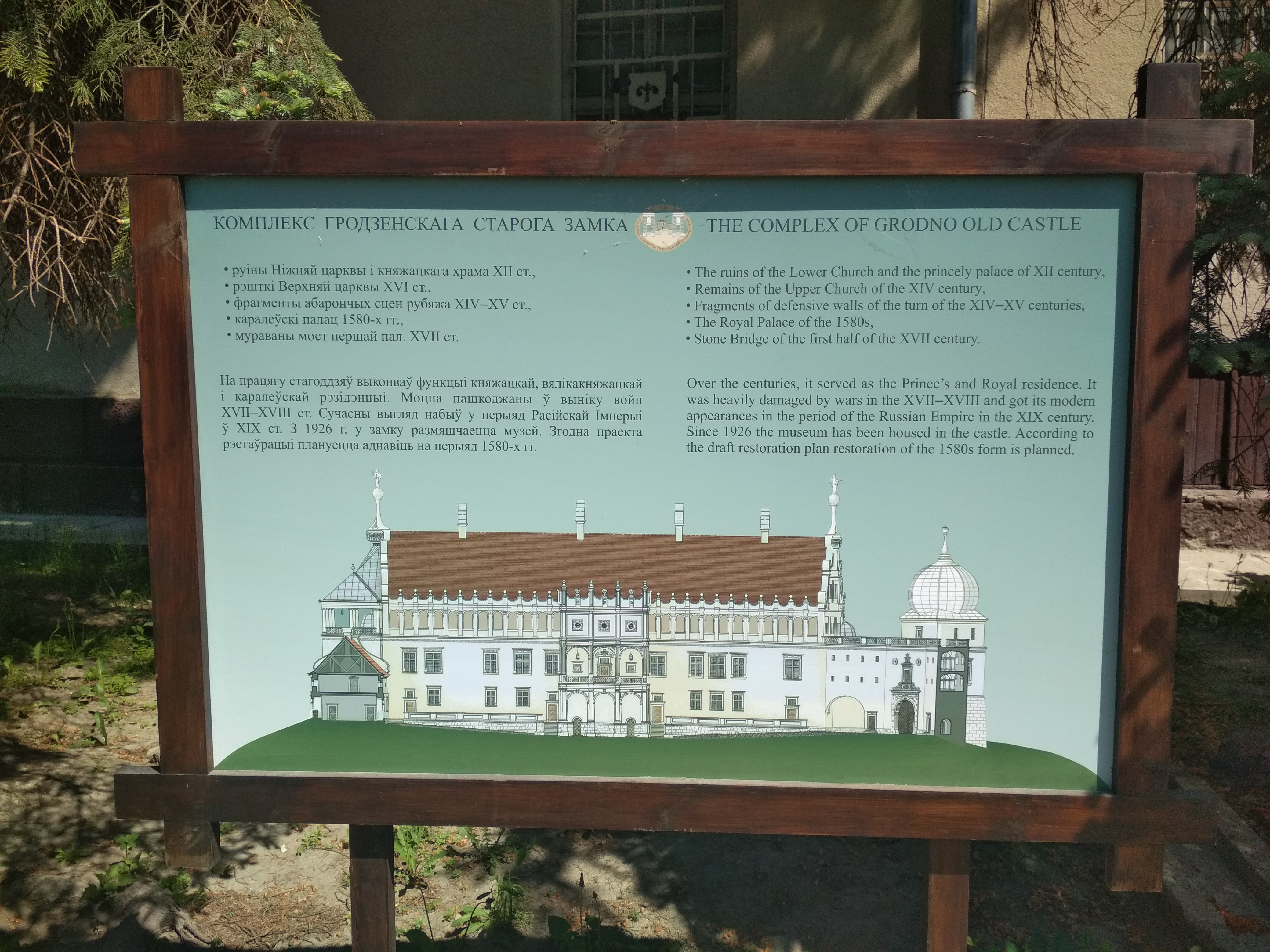 Гродна (2018). Рэстаўрацыя Старога замка